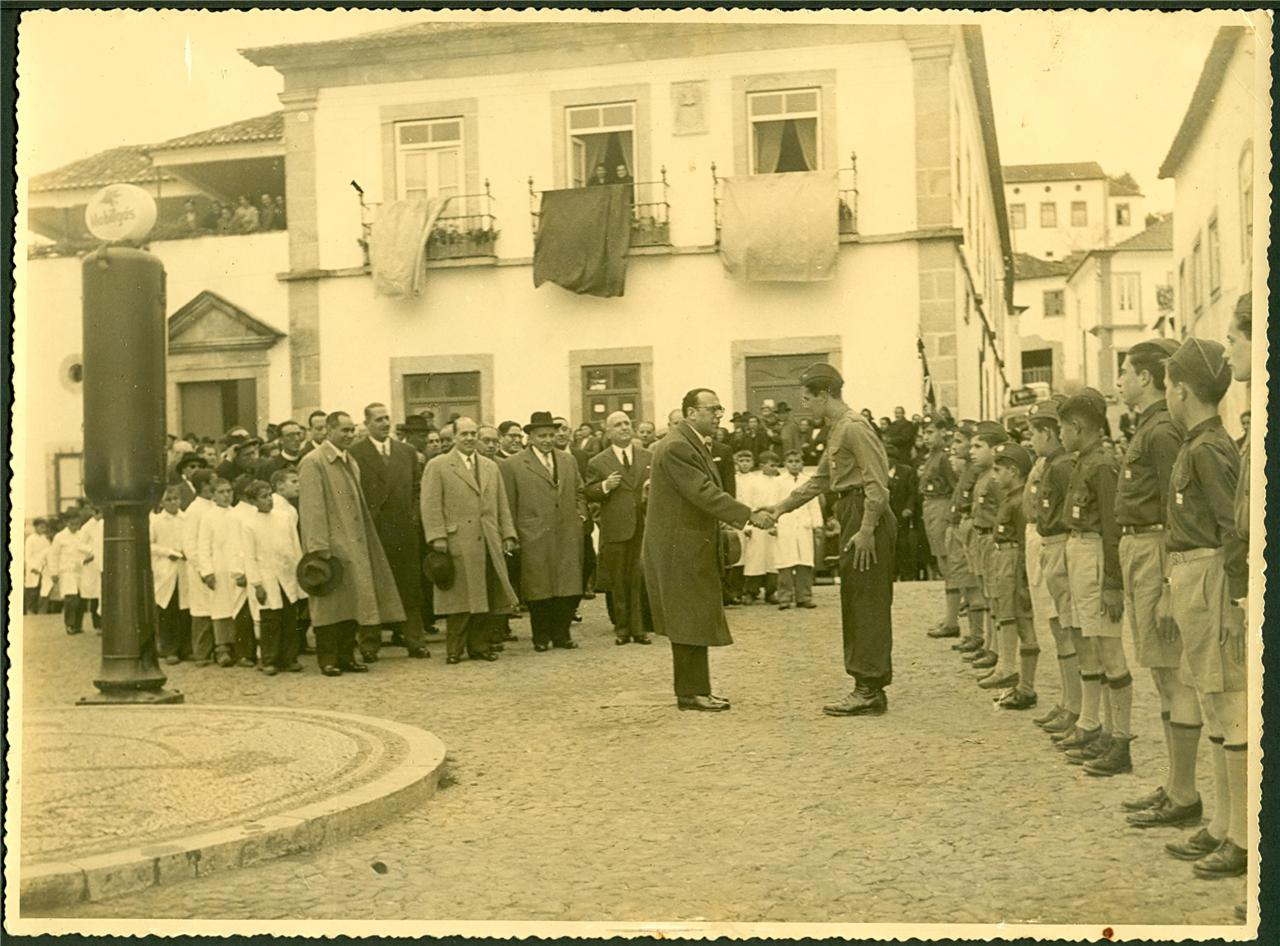 Título: Visita de Baltazar Rebelo de Sousa à vila de Figueiró dos Vinhos Autor: Desconhecido Procedência: Coleção particular Data: 1956 Dimensões: 24 x 18 cm Observações: Visita de Baltazar Rebelo de Sousa em 16 de Dezembro de 1956, durante a inauguração do Hospital da Misericórdia, da Escola Secundária e do Busto de Malhoa. Baltazar Rebelo de Sousa, pai de Marcelo Rebelo de Sousa, foi político e ministro durante o Estado Novo. À direita a Mocidade Portuguesa.